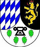 Wappen von Mengerschied